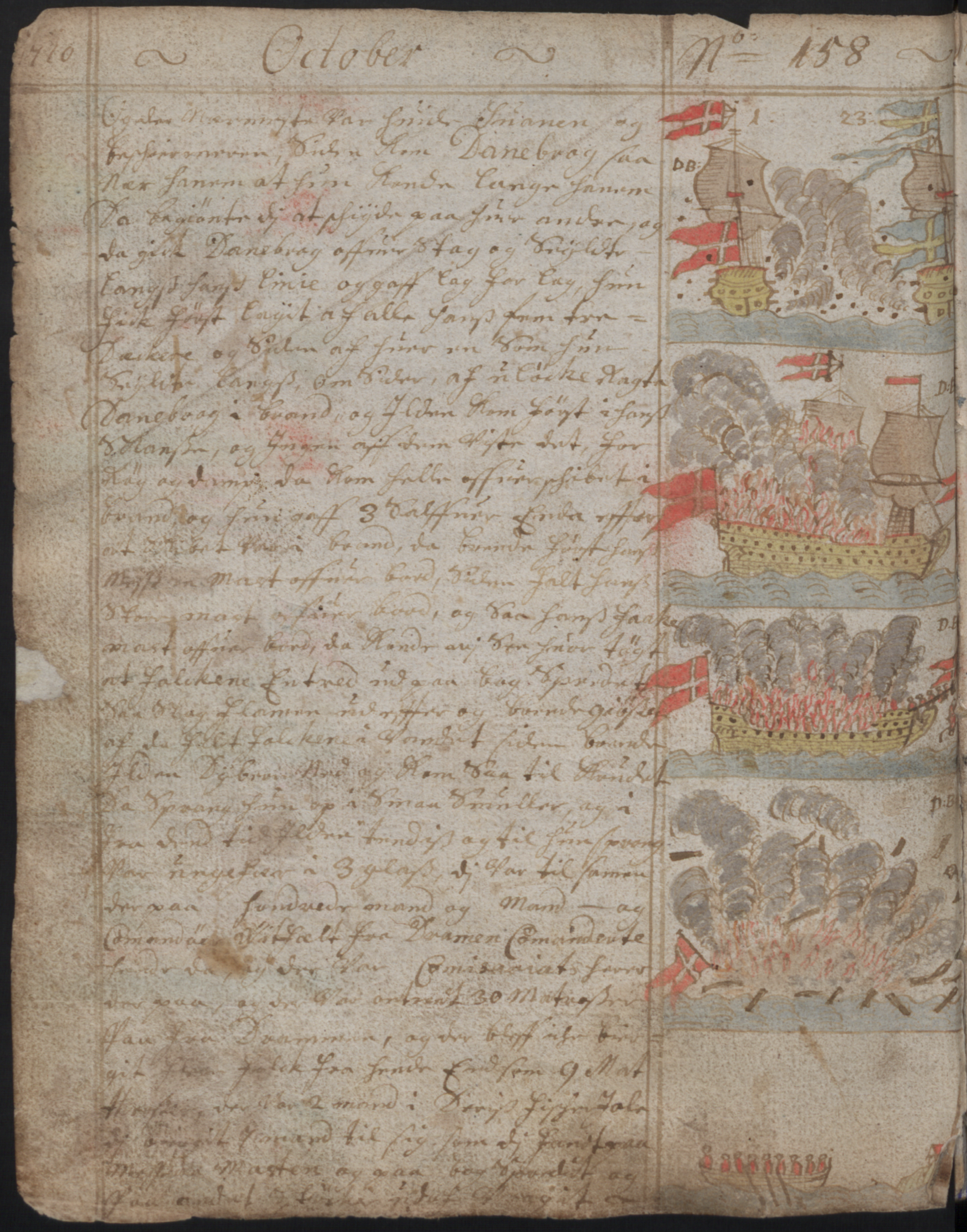 Niels Trosners dagbok fra den store nordiske krig, side fra oktober 1710. Slaget ved Køge bukt.